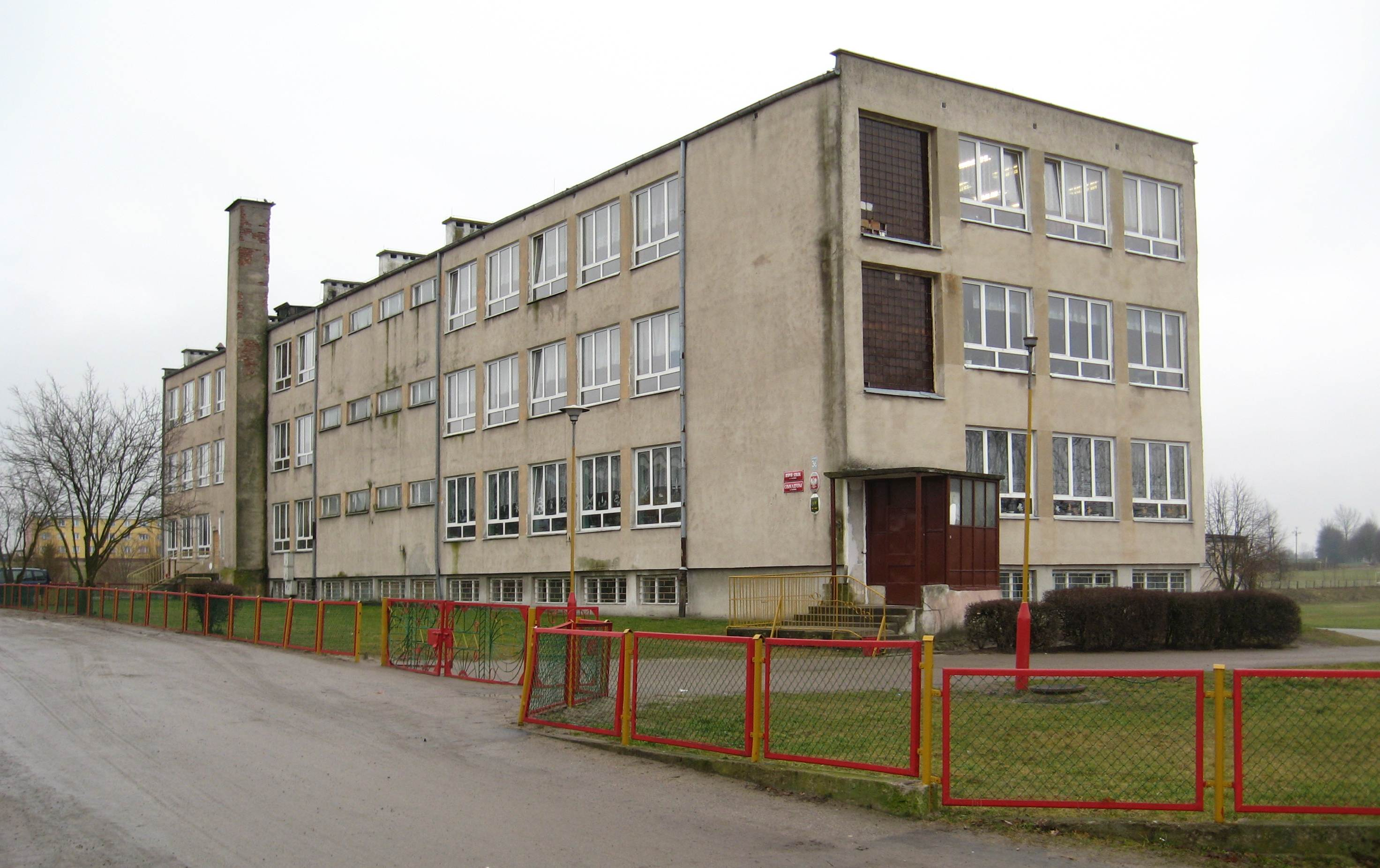 Schule in Garbno